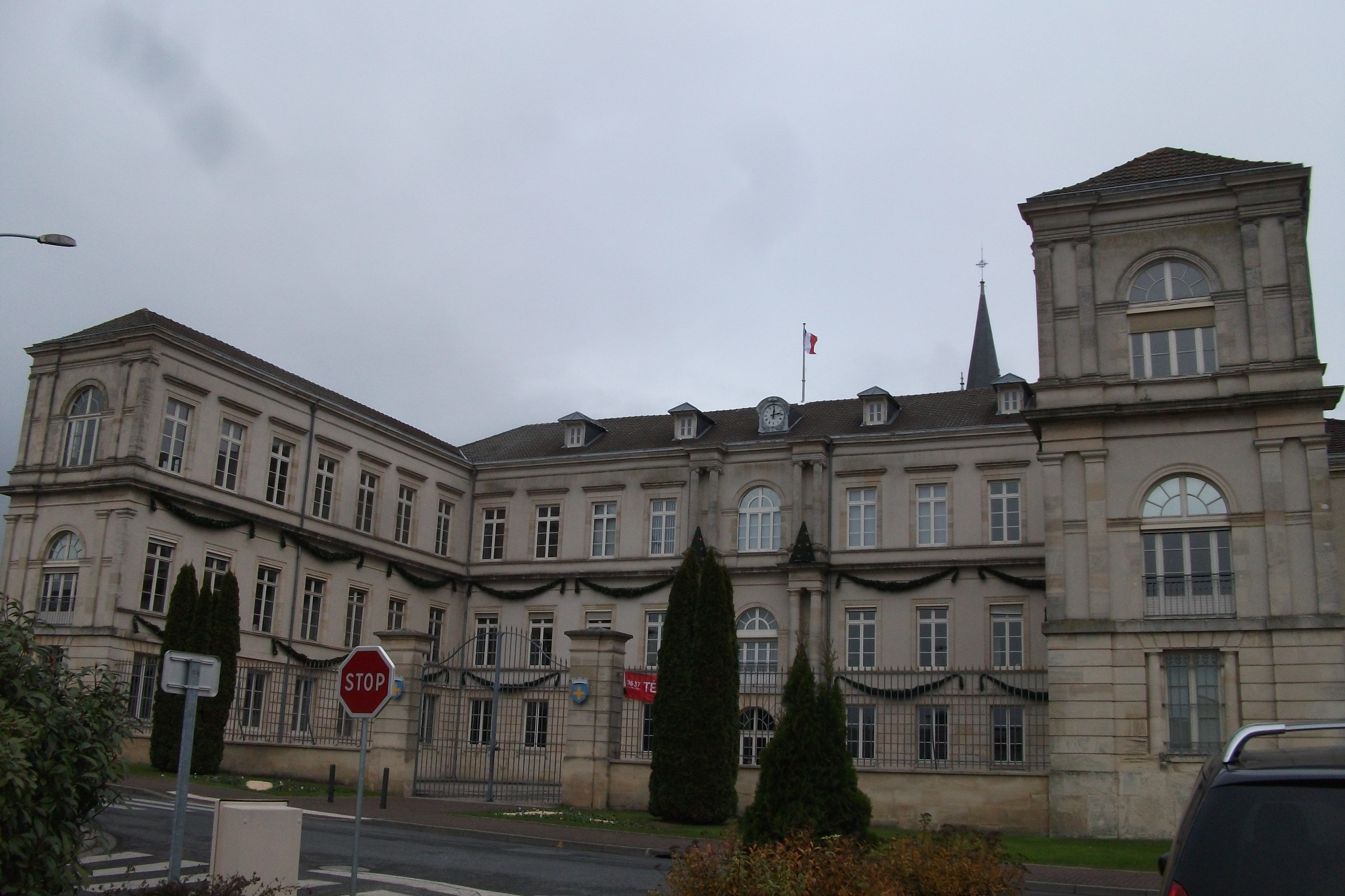 vue de la Mairie de st-Memmie ancien petit séminaire.